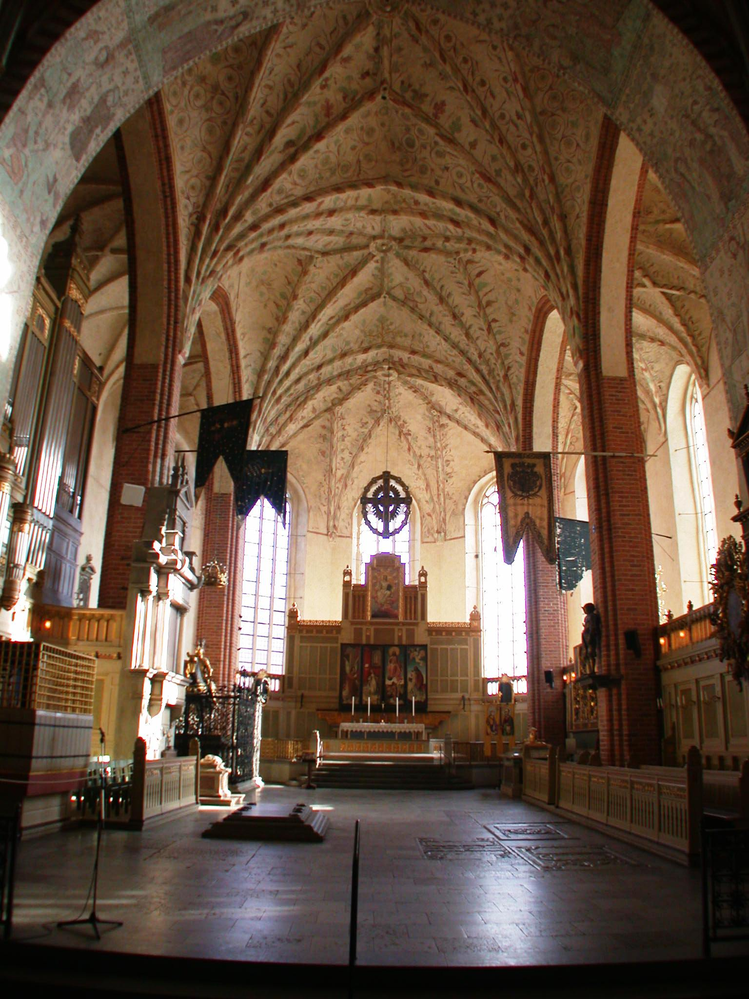 Strängnäs cathedral, Strängnäs, Sweden. Photo by Riggwelter, March 10, 2007.